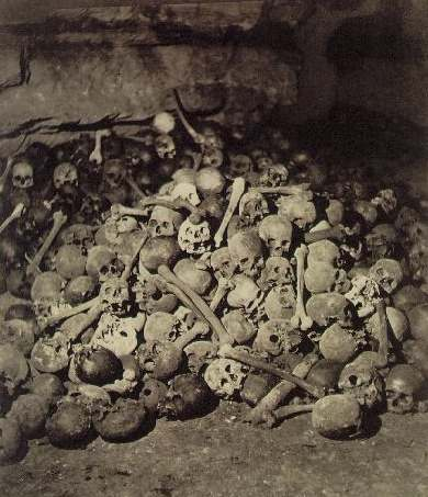 Félix Nadar: Le catacombe, 1861-62